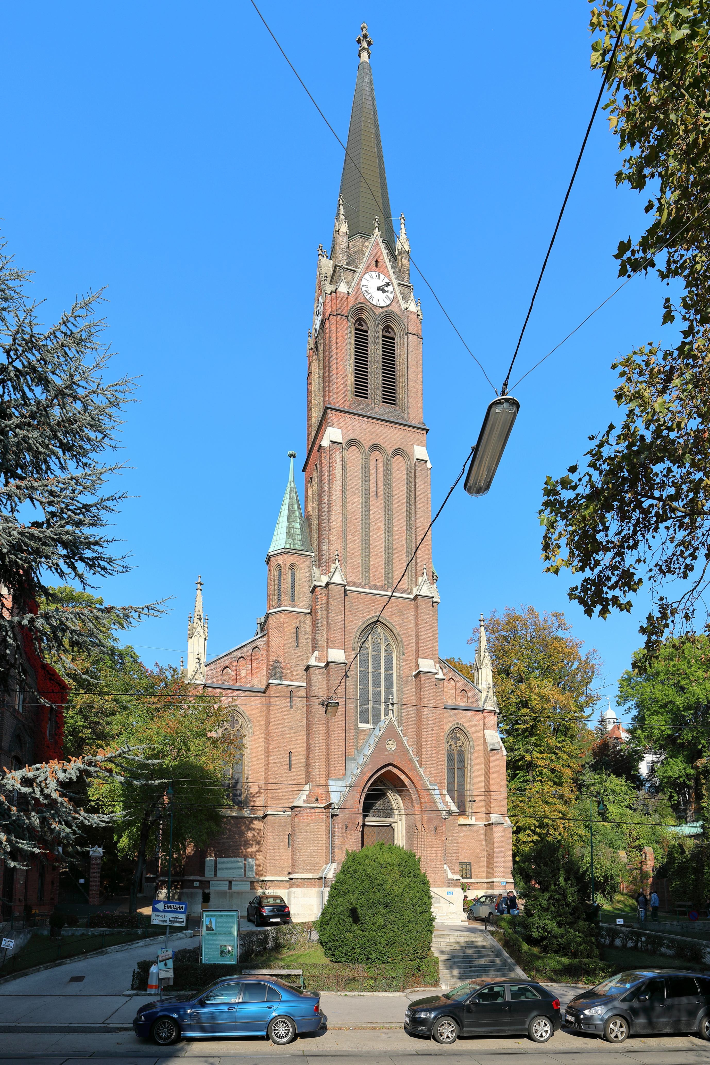 Die römisch-katholischen Weinhauser Pfarrkirche im 18. Wiener Gemeindebezirk Währing. Die Kirche wurde nach Plänen des Wiener Dombaumeisters Friedrich von Schmidt unter Baumeister Johann Schmalzhofer von 1883 bis 1893 errichtet.